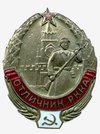 Знак “Отличник РККА”